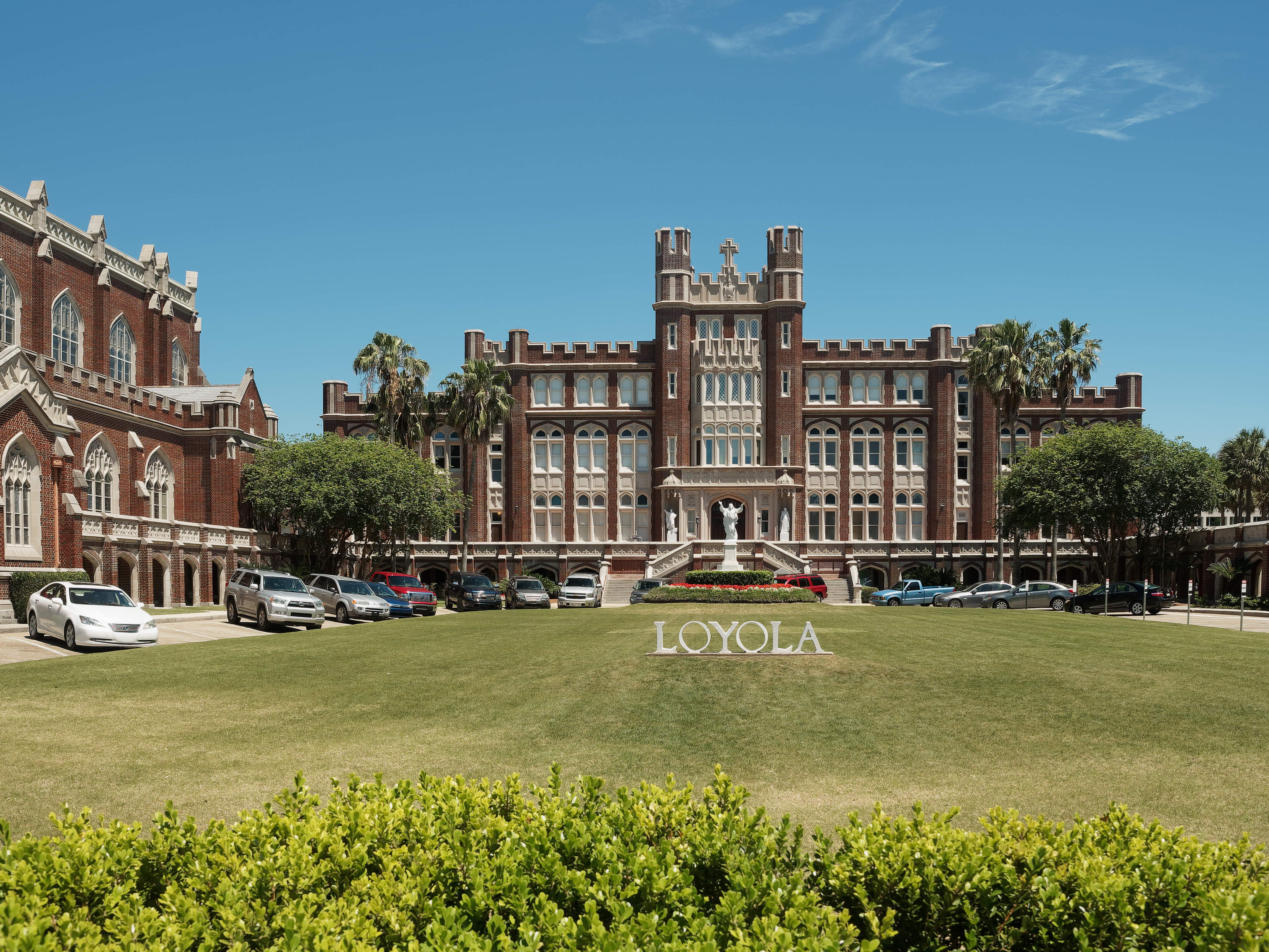 New Orleans (La, USA) Loyola Universität, Marquette Hall